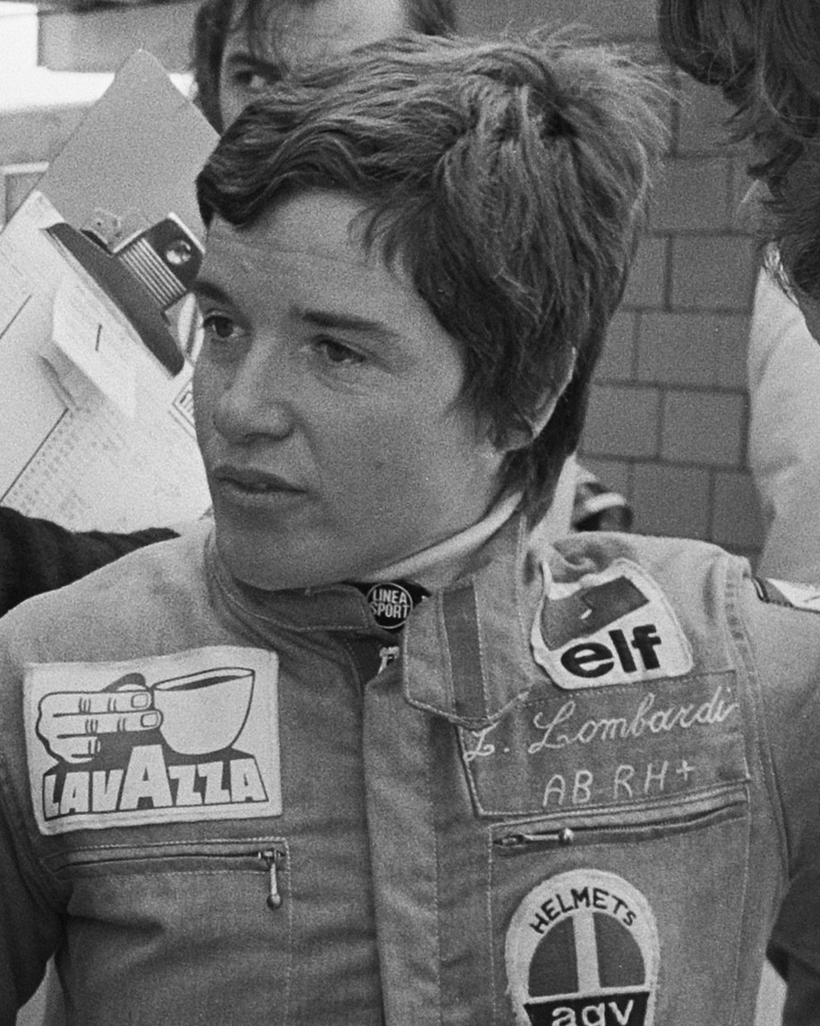 Lella Lombardi et Vittorio Brambilla discute lors des essais du Grand Prix des Pays-Bas 1975.